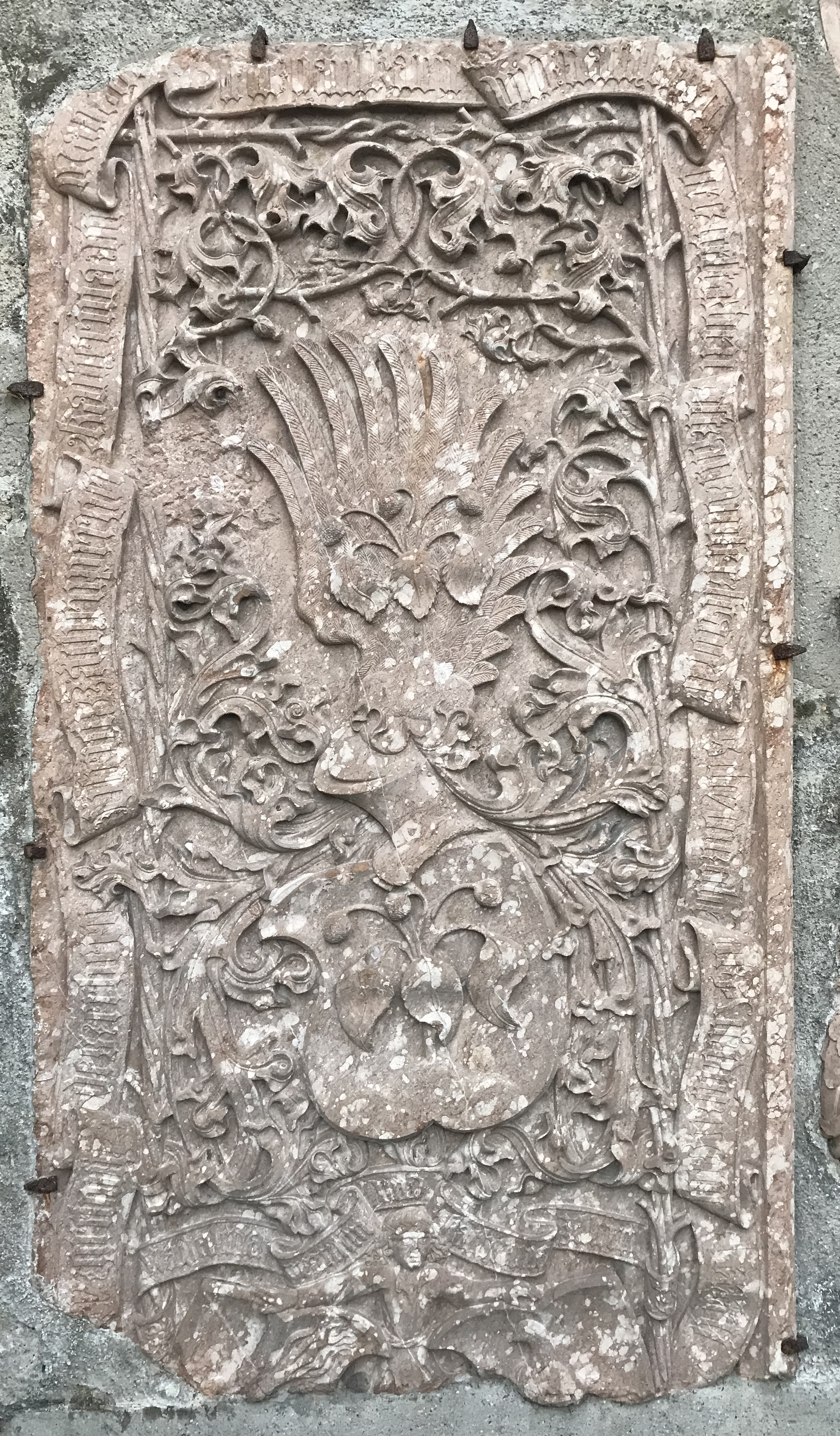 Grabstein an der Außenwand von St. Jakob, Burghausen. Epithaph für den Bürgermeister Ulrich Zächenperger (+ 14. August 1492) und seine beiden Gemahlinnen Magdalena geb. Prant und Katharina geb. Zeller von Franz Sickinger. Der Grabstein weist Beschädugungen auf, die vermutlich von einer unsachgemäßen Versetzung im 19. Jahrhundert herrühren. "Man kann sich kaum einen schöneren Wappengrabstein zwischen Isar und Salzach als diesen Zächenperger-Grabstein zu Burghausen denken" (Volker Liedke in Stadt Burghausen (Hrsg.): Die Burghauser Sepulkralskulptur der Spätgotik. Burghauser Geschichtsblätter 36. Folge. Burghausen 1981)